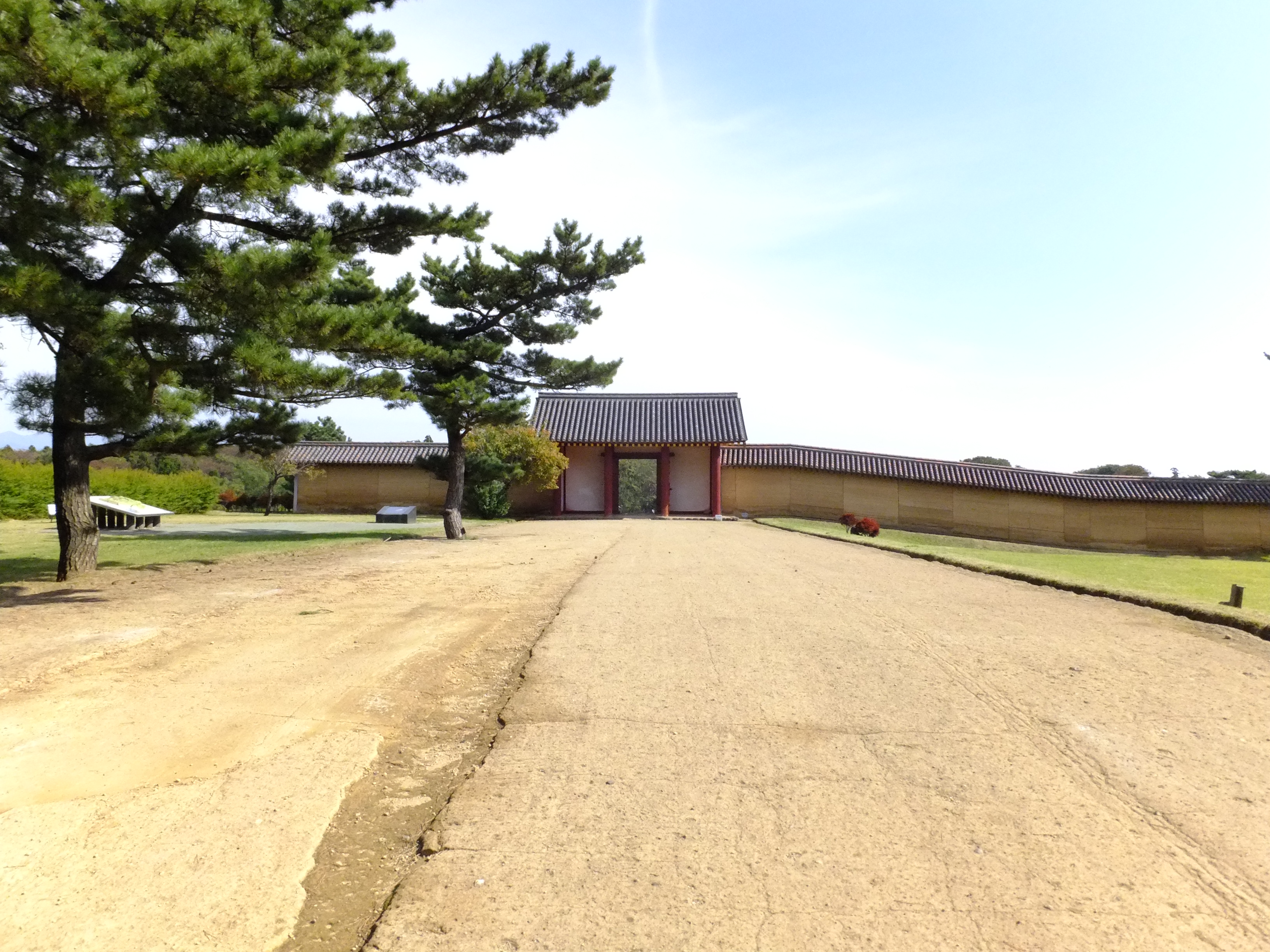 秋田城跡東門